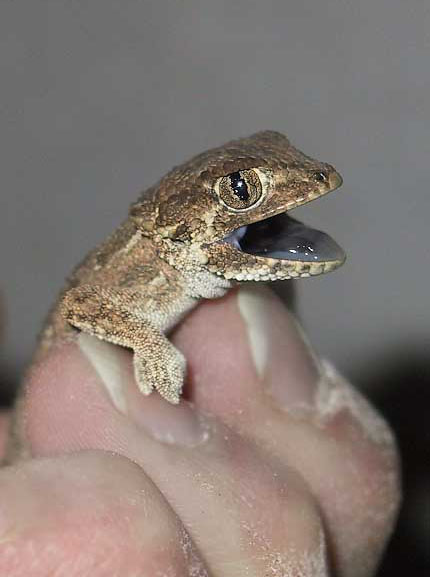 Helmeted Gecko - Tarentola chazaliae